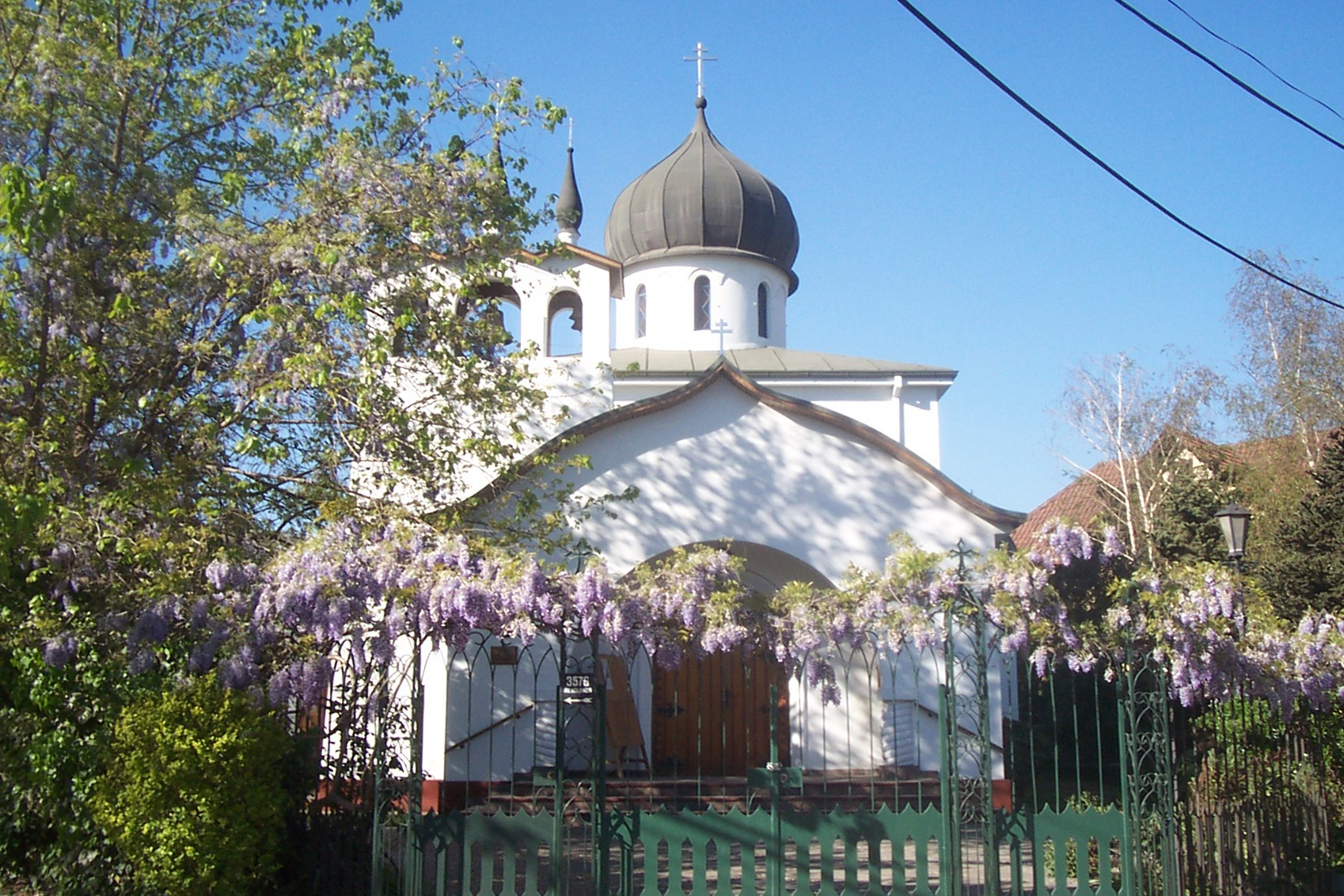 Iglesia en Septiembre de 2004